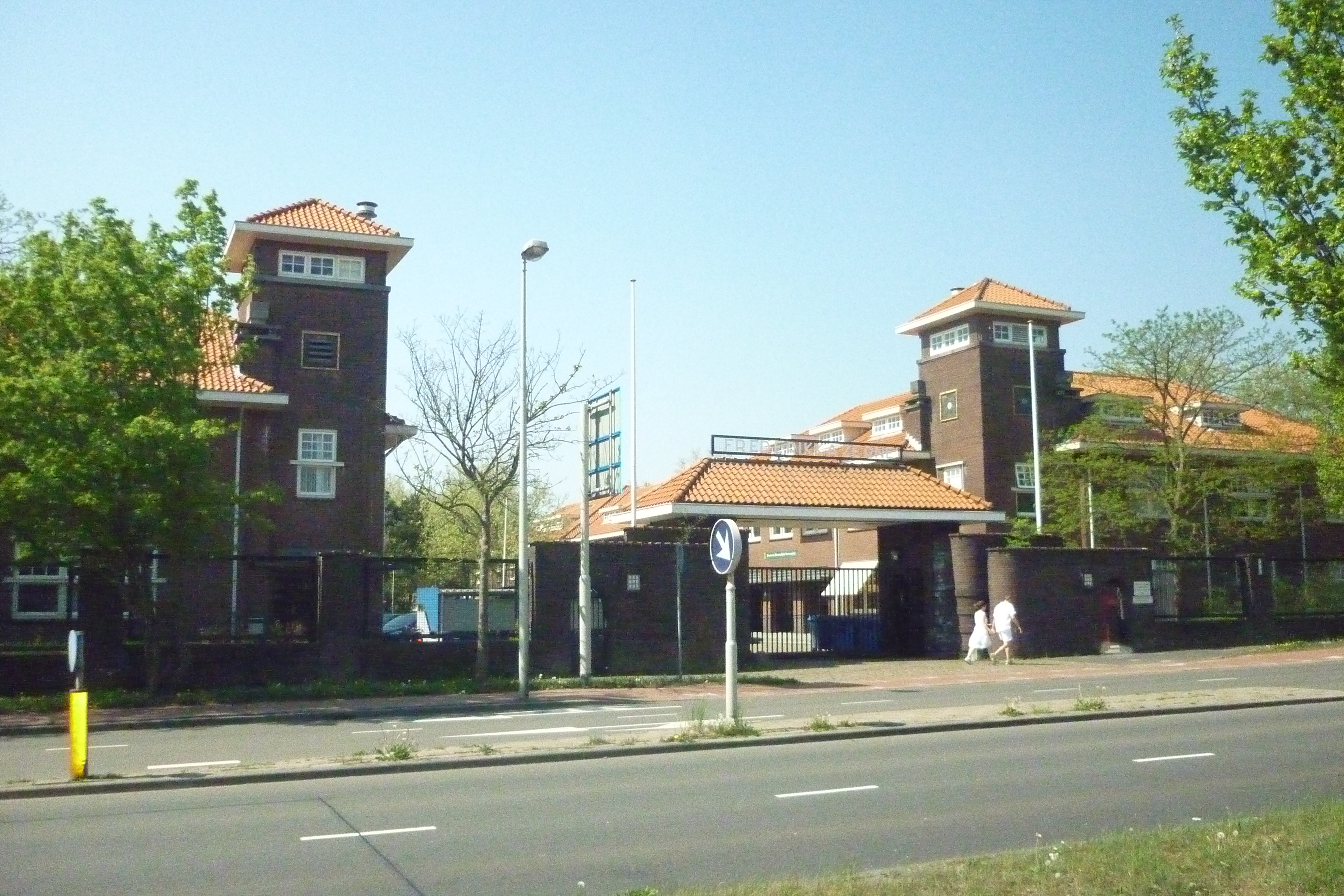 Frederikkazerne Den Haag